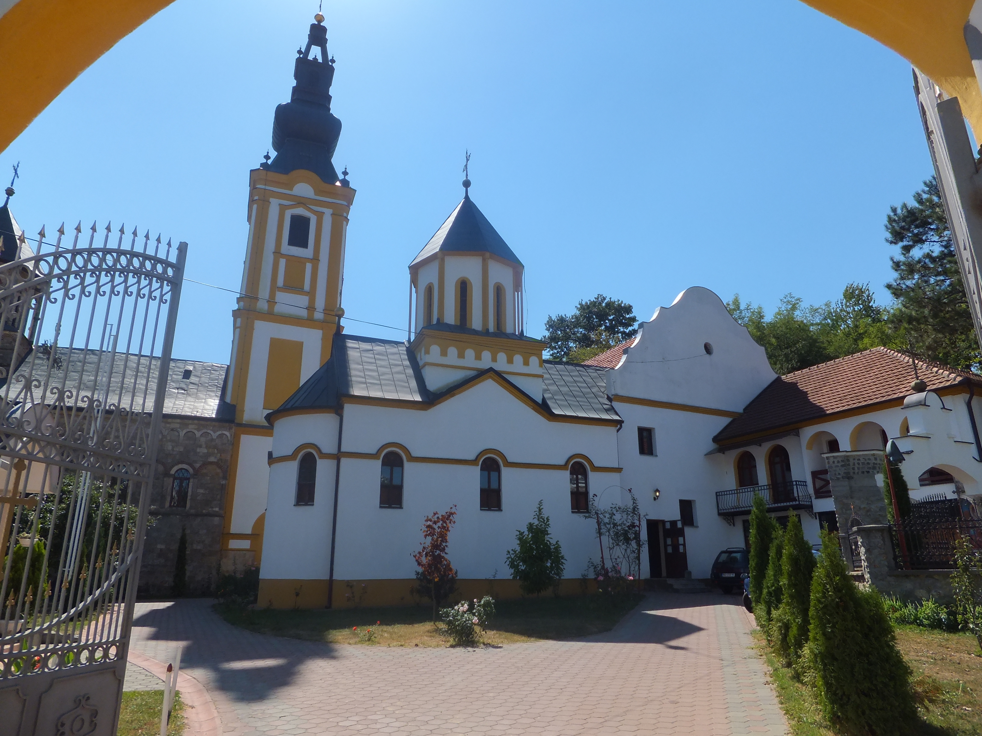 Манастир Привина Глава